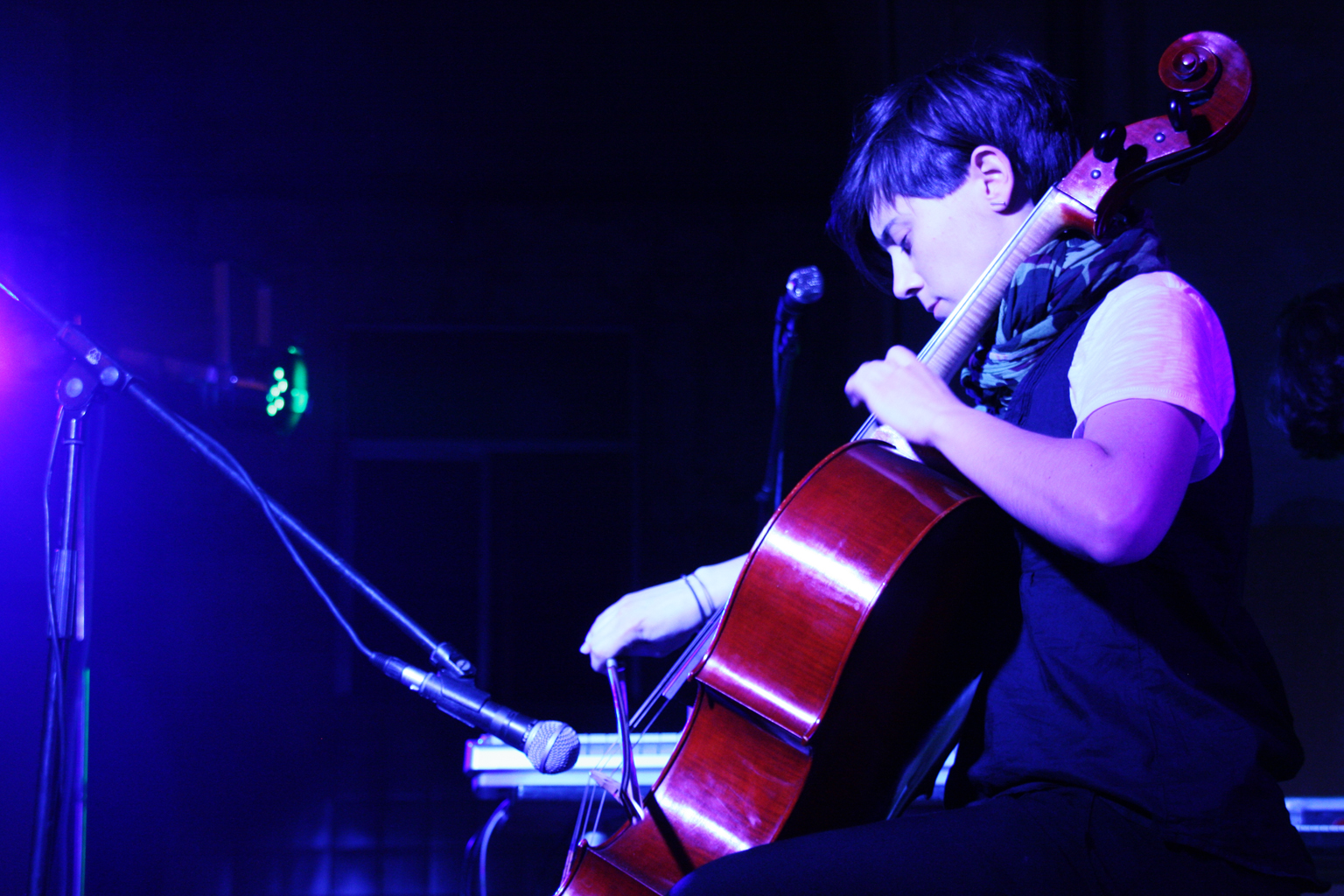 Concierto de Mursego en el festival feminista Ladyfest Madriz 2010, CSA Tabacalera.